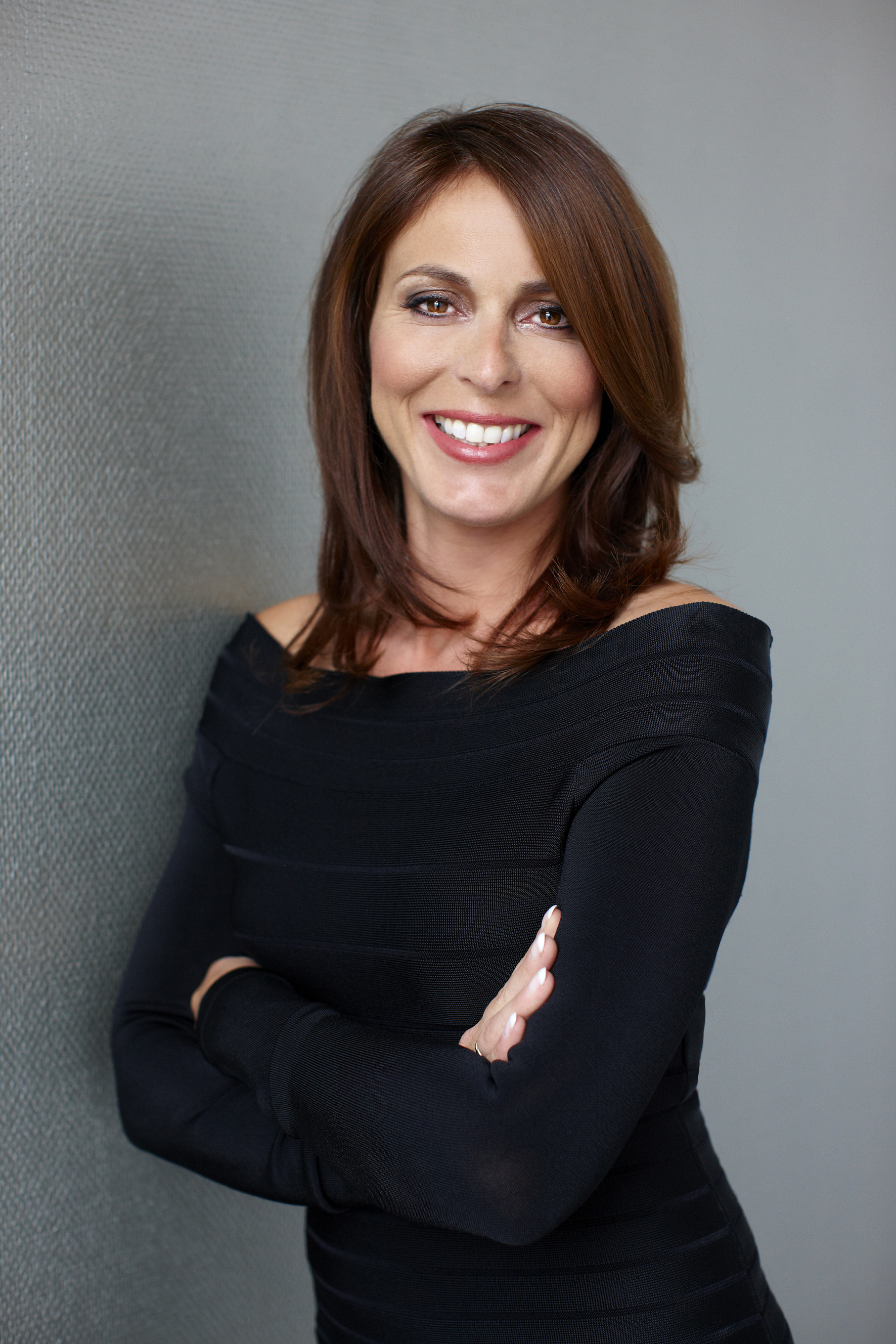 Schrijfster Heleen van Royen